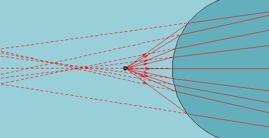 Schéma dioptre sphérique : non stigmatisme (schéma personnel) Catégorie:Schéma de physique